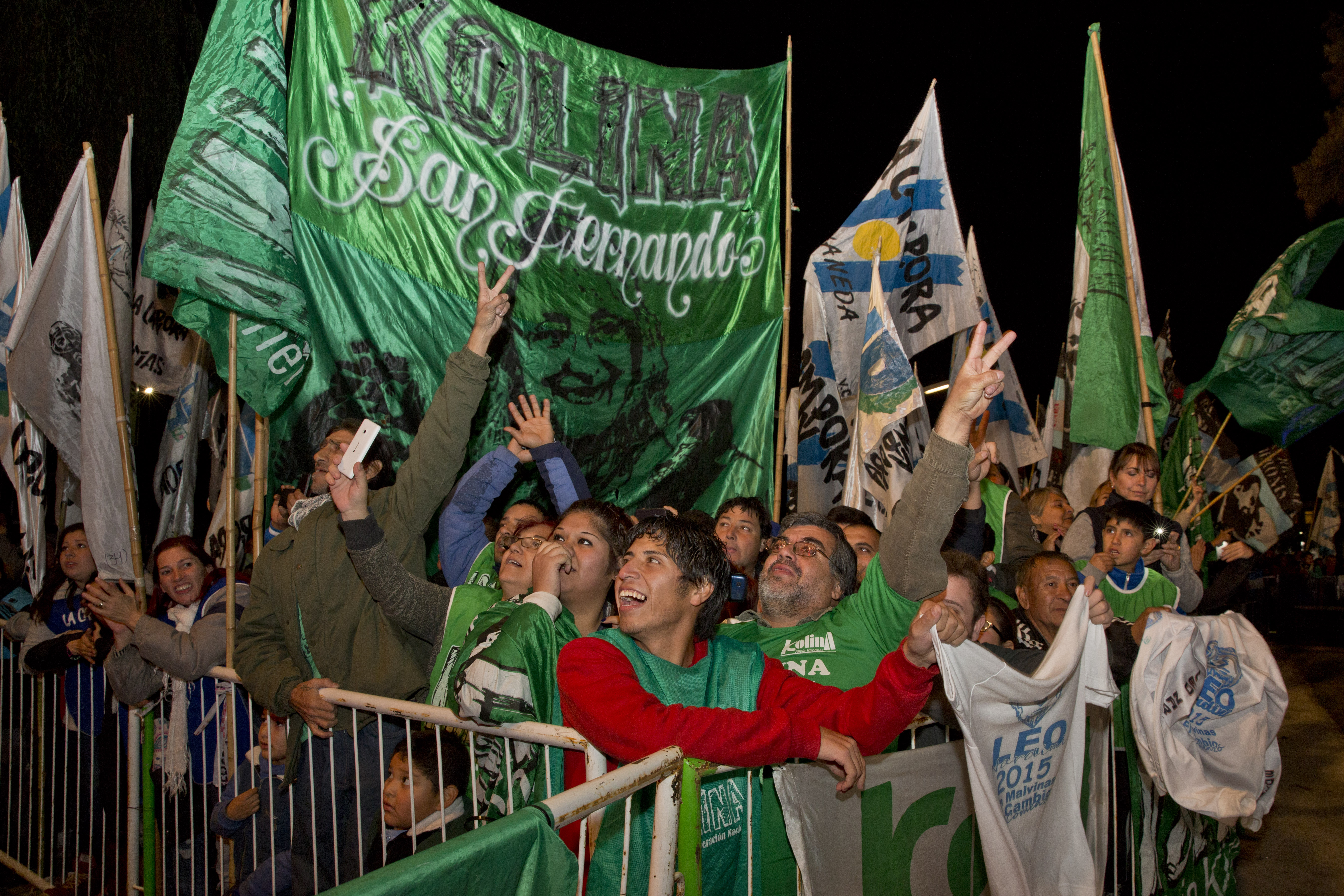 Buenos Aires, 10 de junio de 2015.- La presidenta Cristina Fernández de Kirchner encabezó el acto en conmemoración del Día de Reafirmación de los Derechos Soberanos sobre las Islas Malvinas, en una ceremonia realizada en el Museo Malvinas e Islas del Atlántico Sur, ubicado en el predio del Espacio de la Memoria (ExESMA). En la celebración del primer aniversario de este Museo, la Presidenta dejó inaugurada además la muestra permanente “Perón y las Malvinas”, en el primer piso del edificio, y el denominado Faro de la Soberanía. Foto: Augusto Starita / Ministerio de Cultura de la Nación.